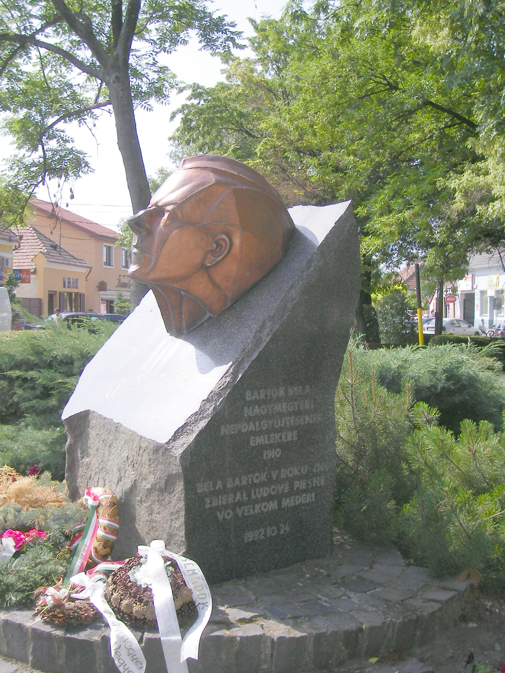 Nagymegyer - Bartók Béla szobra